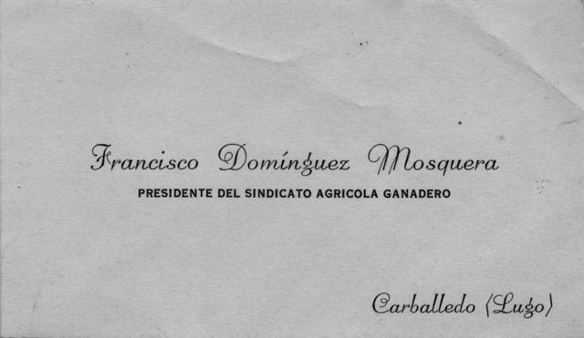 Tarxeta de visita de Francisco Domínguez Mosquera